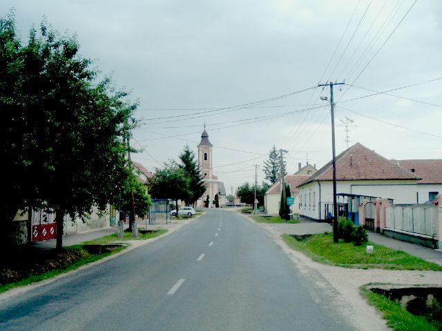 Kenéz, Hungary